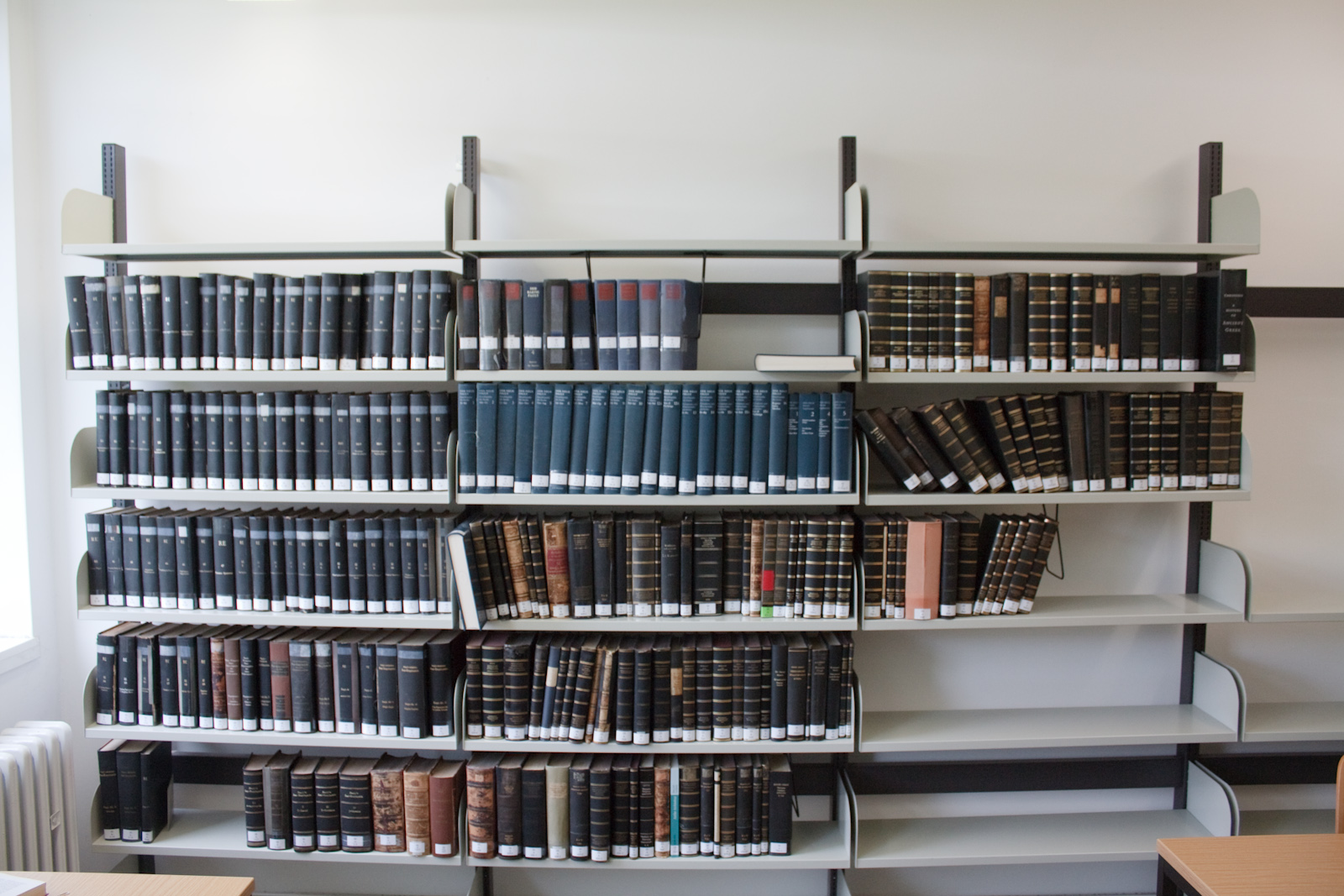 Bücherregal mit dem Pauly-Wissowa-Kroll-Ziegler (links, samt Original-Pauly), dem Kleinen Pauly (Mitte, obere Reihe), dem Neuen Pauly (Mitte, zweite Reihe von oben) und dem Handbuch der Altertumswissenschaft (Mitte unten und rechts).